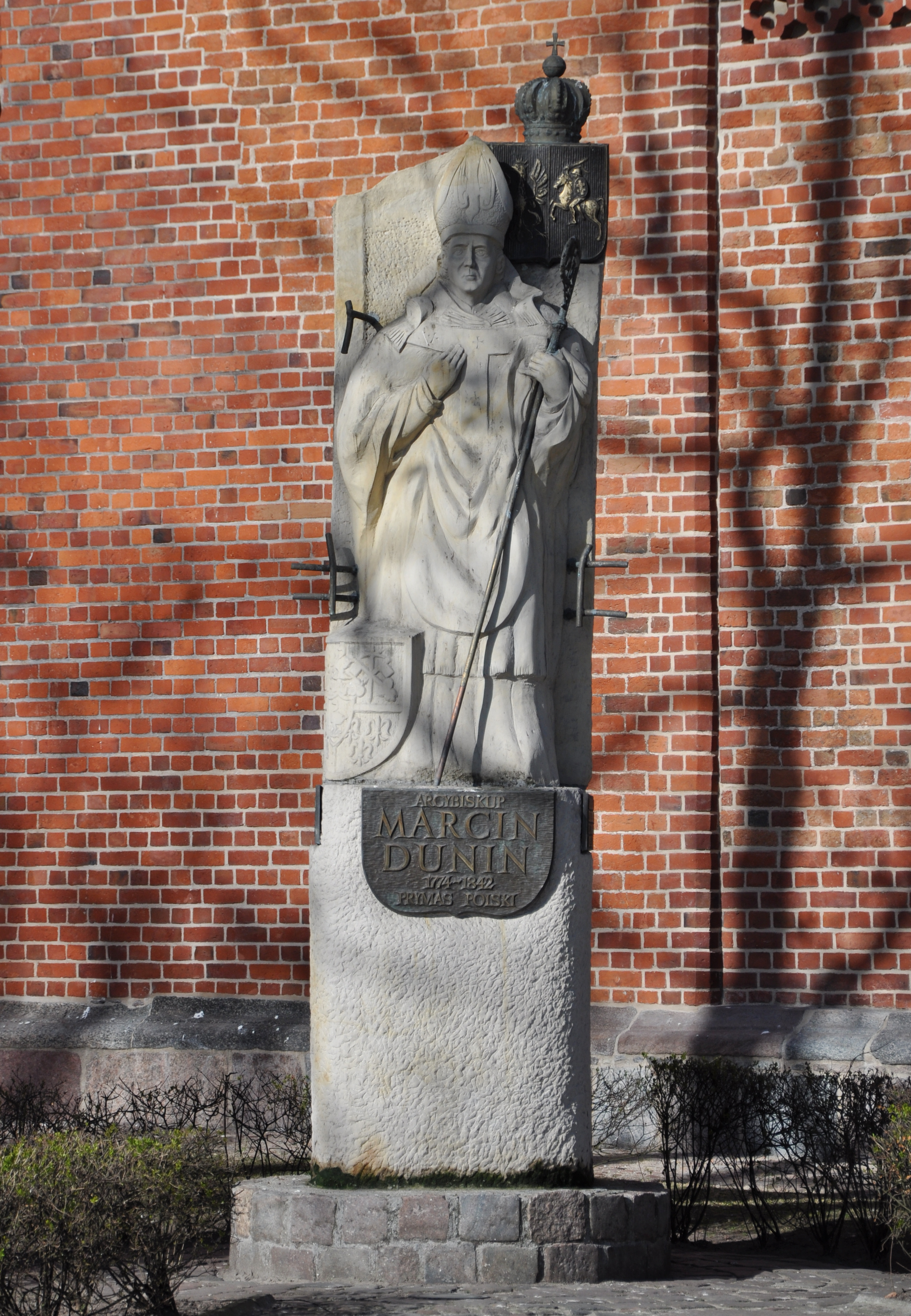 Pomnik arcybiskupa Marcina Dunina, prymasa Polski w Kołobrzegu przy bazylice katedralnej